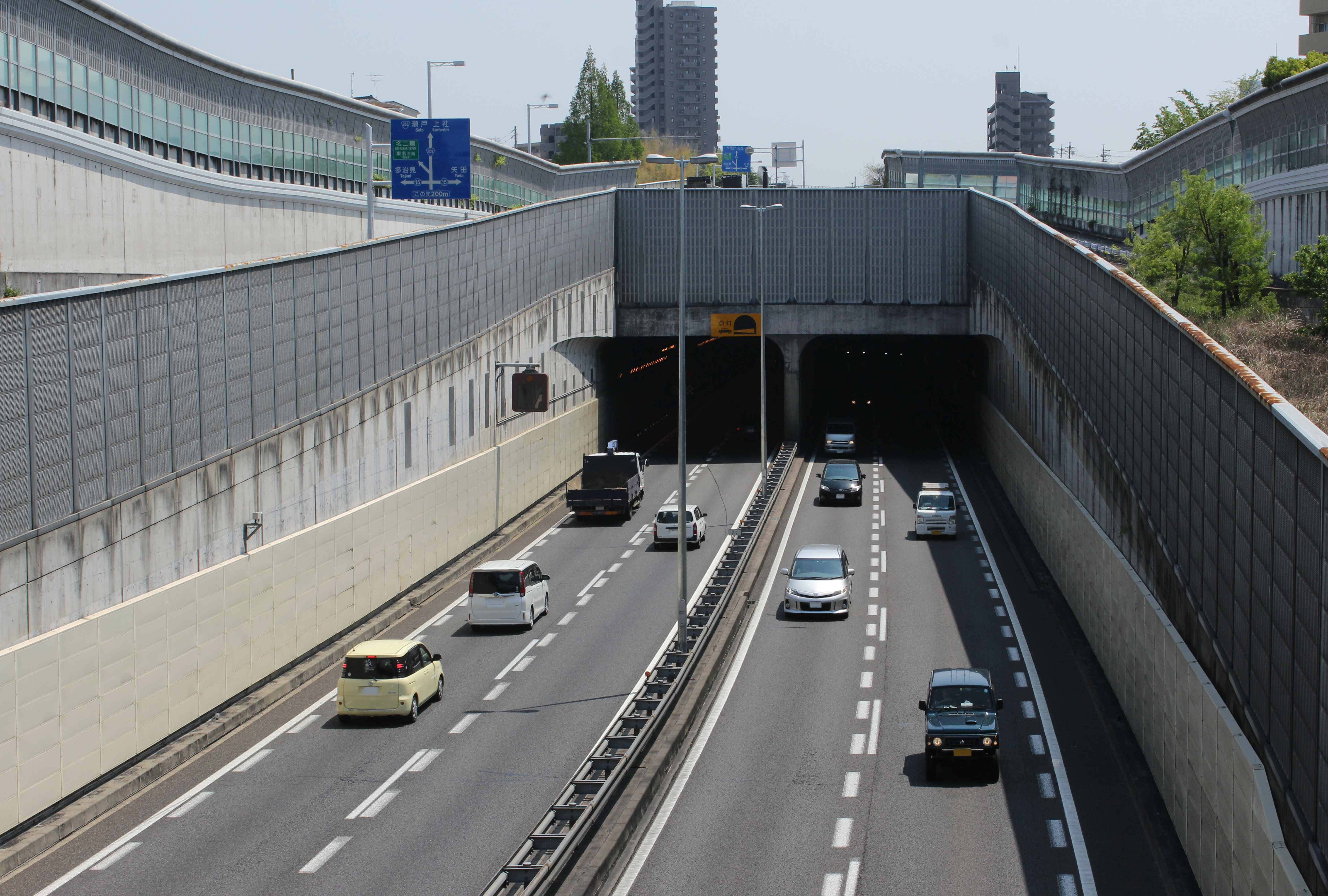 名二環 白沢川トンネル（松河戸IC方面側）